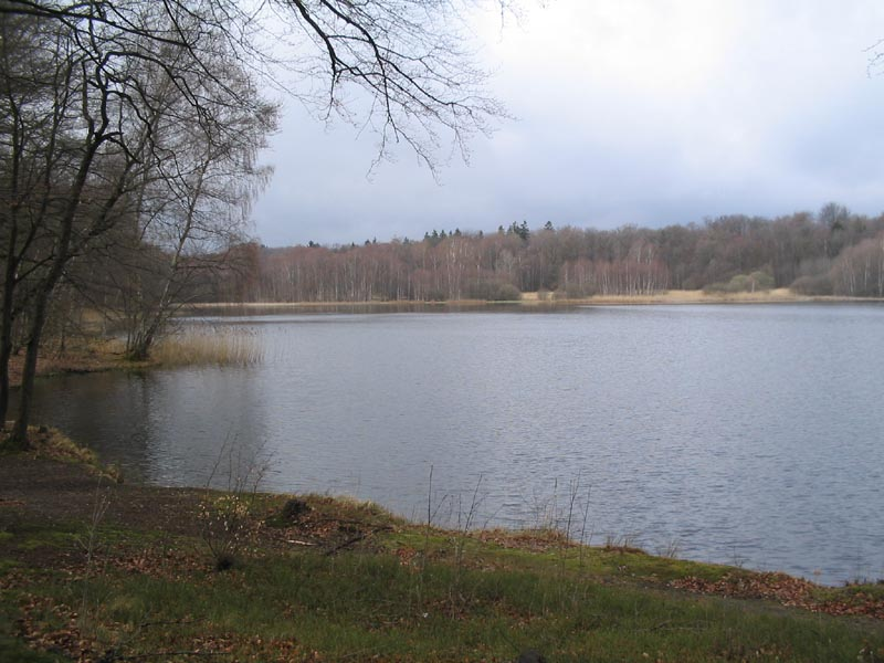 Priorteich Samtgemeinde Walkenried